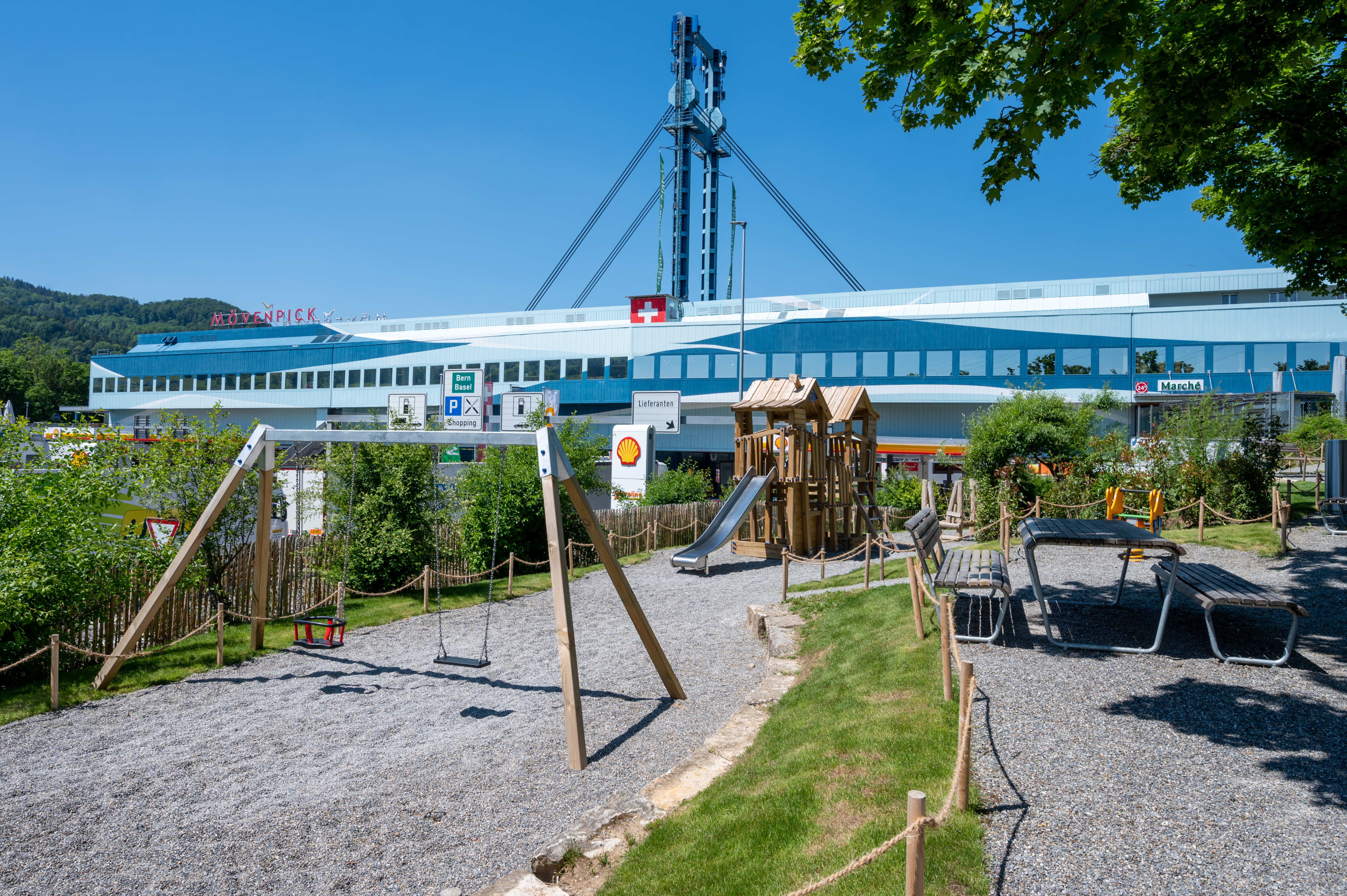 Die Aussenansicht der Shopping-Raststätte Würenlos wurde vom neuen Spielplatz auf der Waldseite/Seite Würenlos der Autobahn aufgenommen (Fahrtrichtung Basel/Bern).